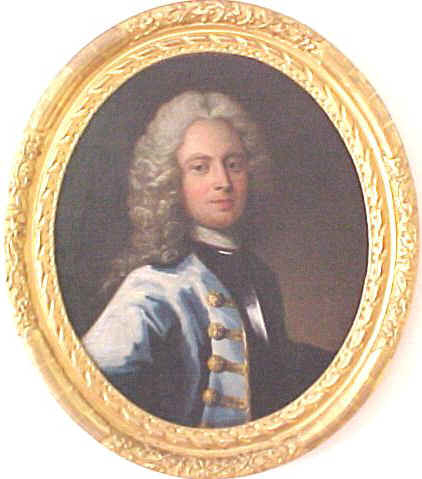 Admiral Gustaf von Psilander.